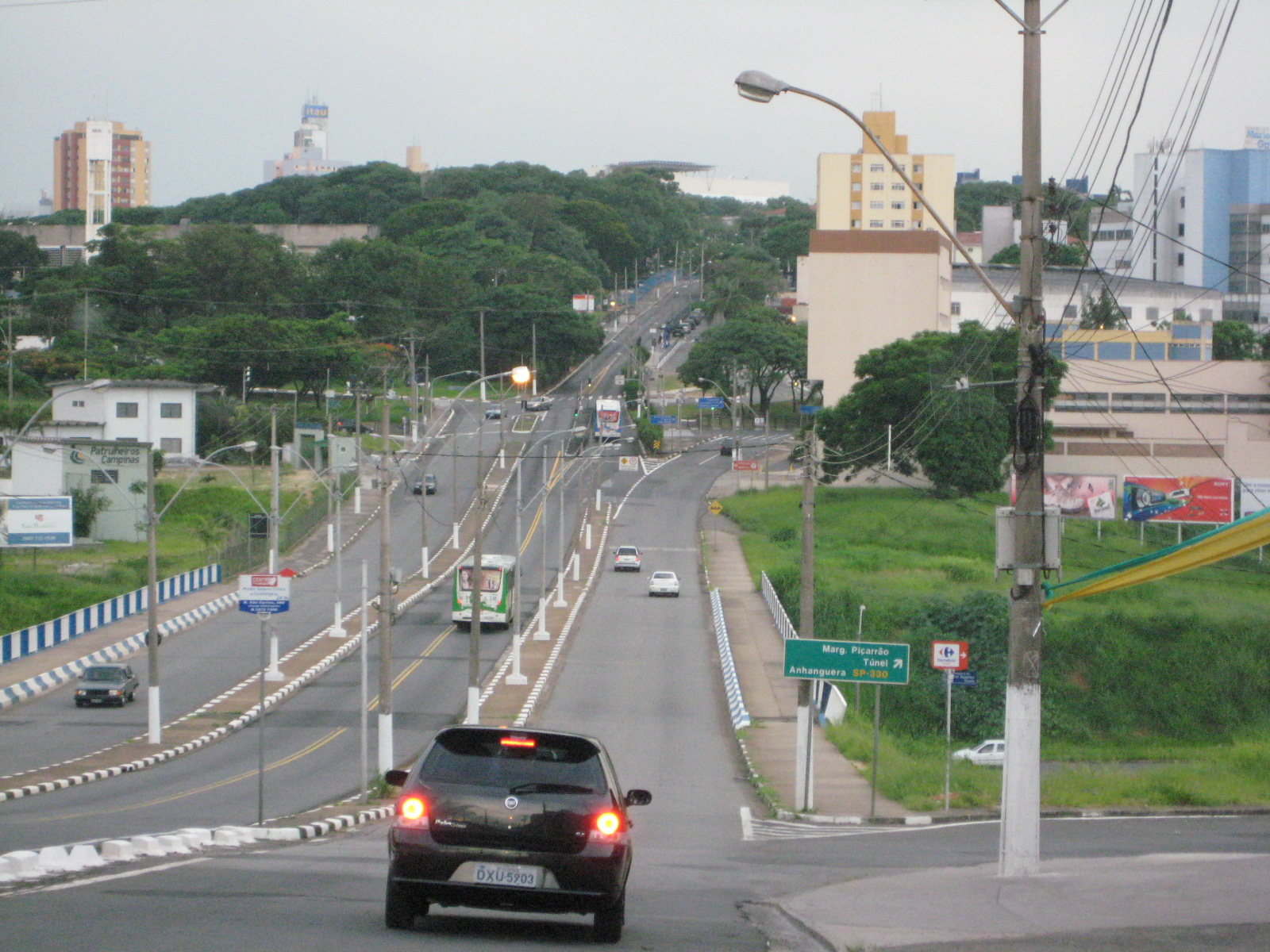 Amoreiras x marg. Piçarrão